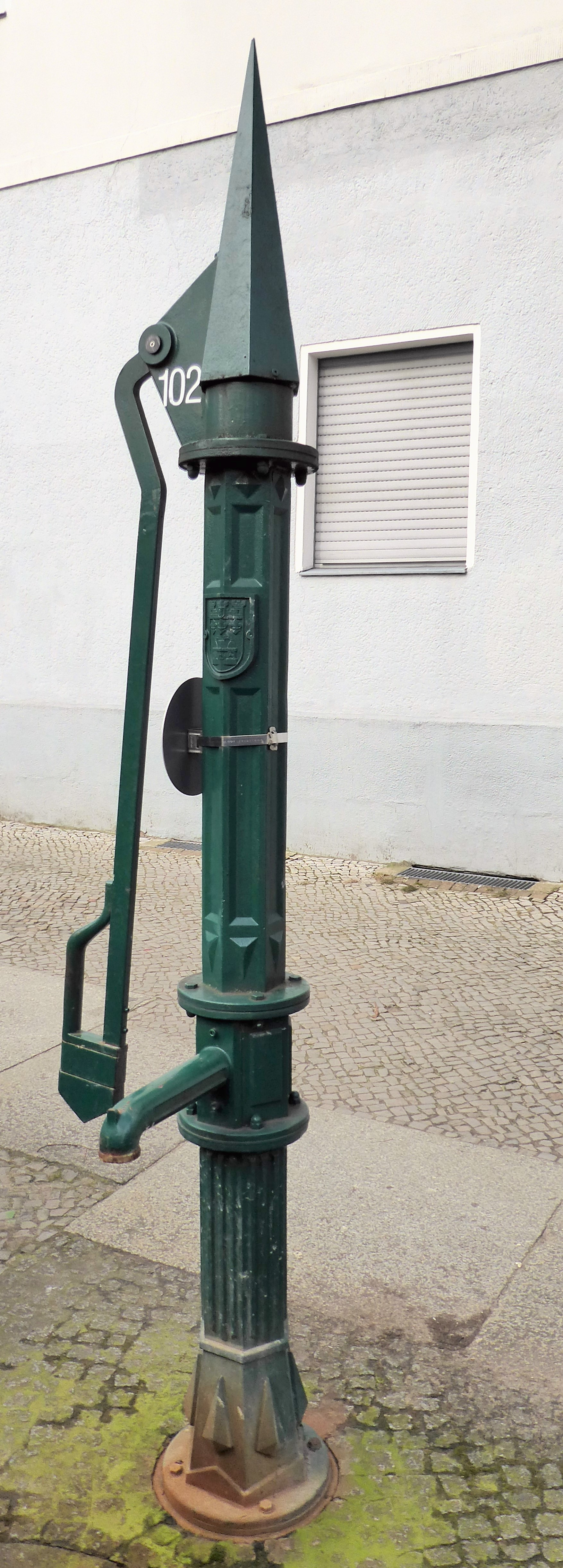 Charlottenburg Rönnestraße 28 Wasserpumpe #102